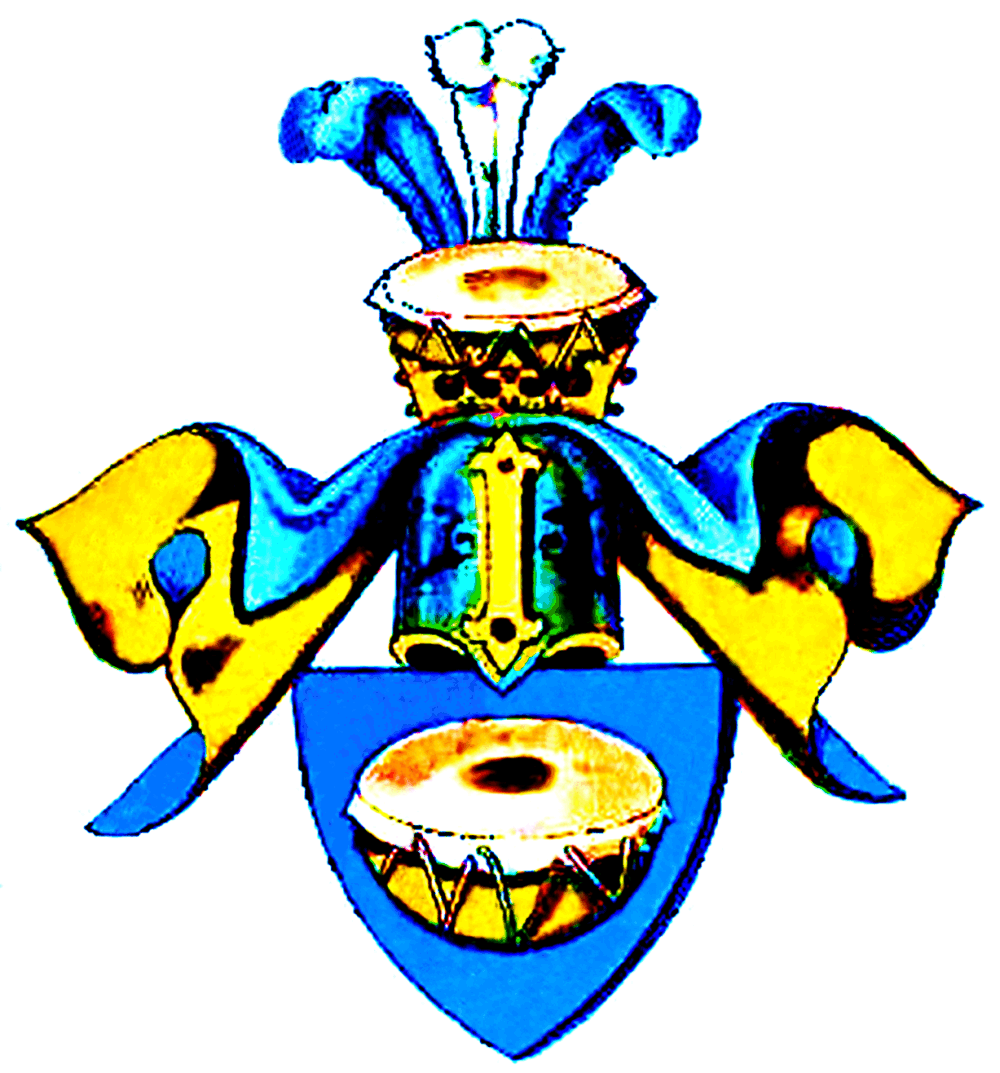 Wappen dere von Buben (Bubna) vor 1500